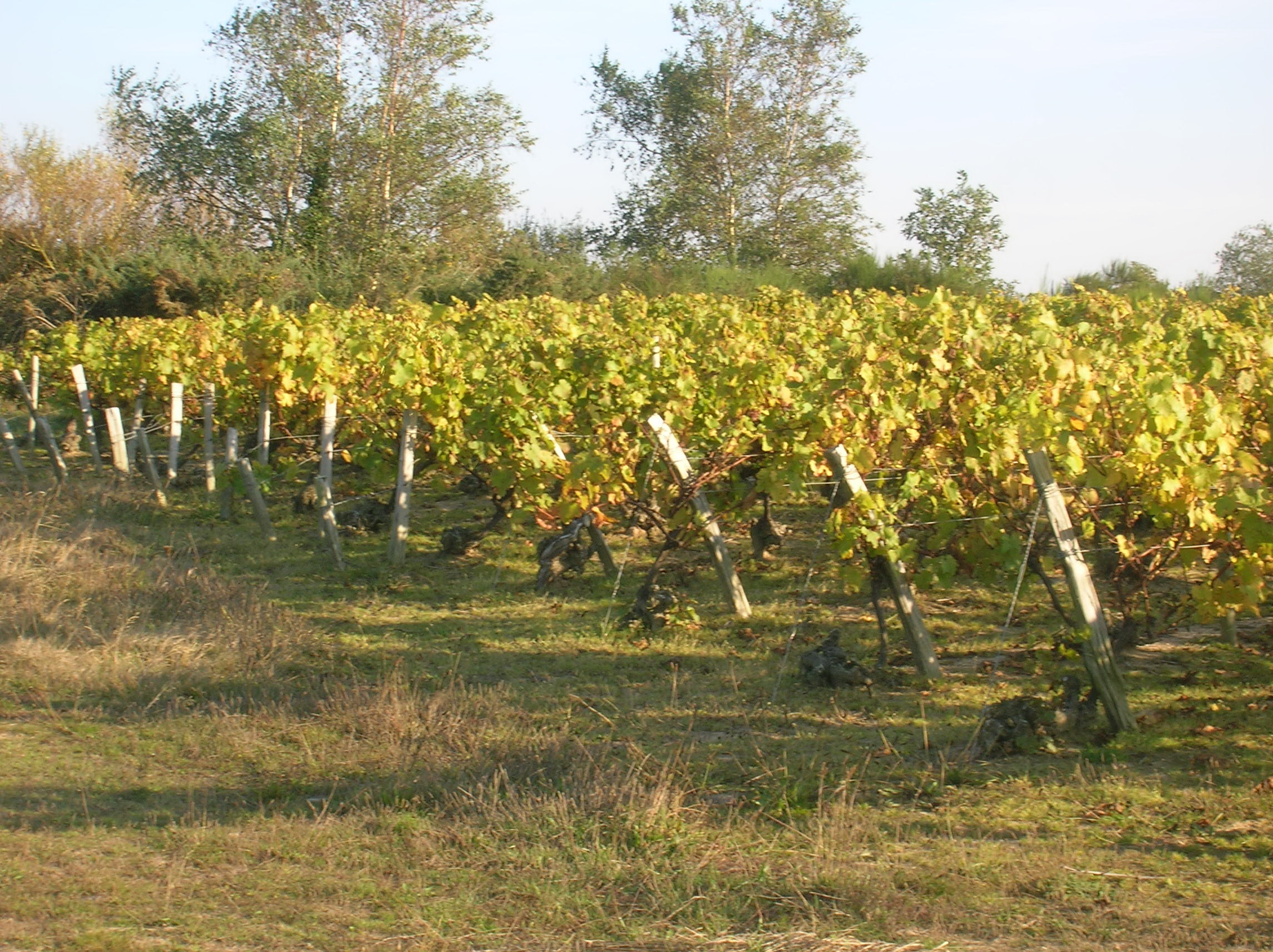 La vigne après les vendanges